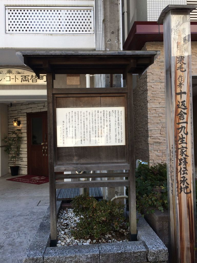 十返舎一九生家跡の木碑と、看板。